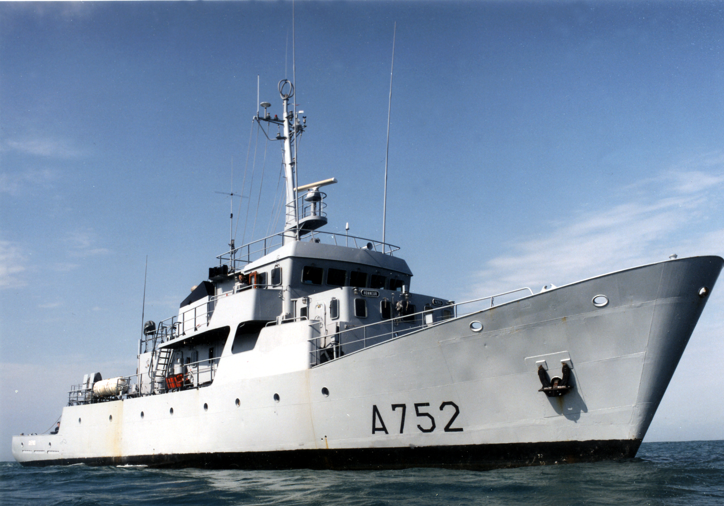 Bâtiment école Guépard